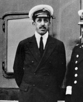 Alfonso XIII, rey de España (1886 - 1931).